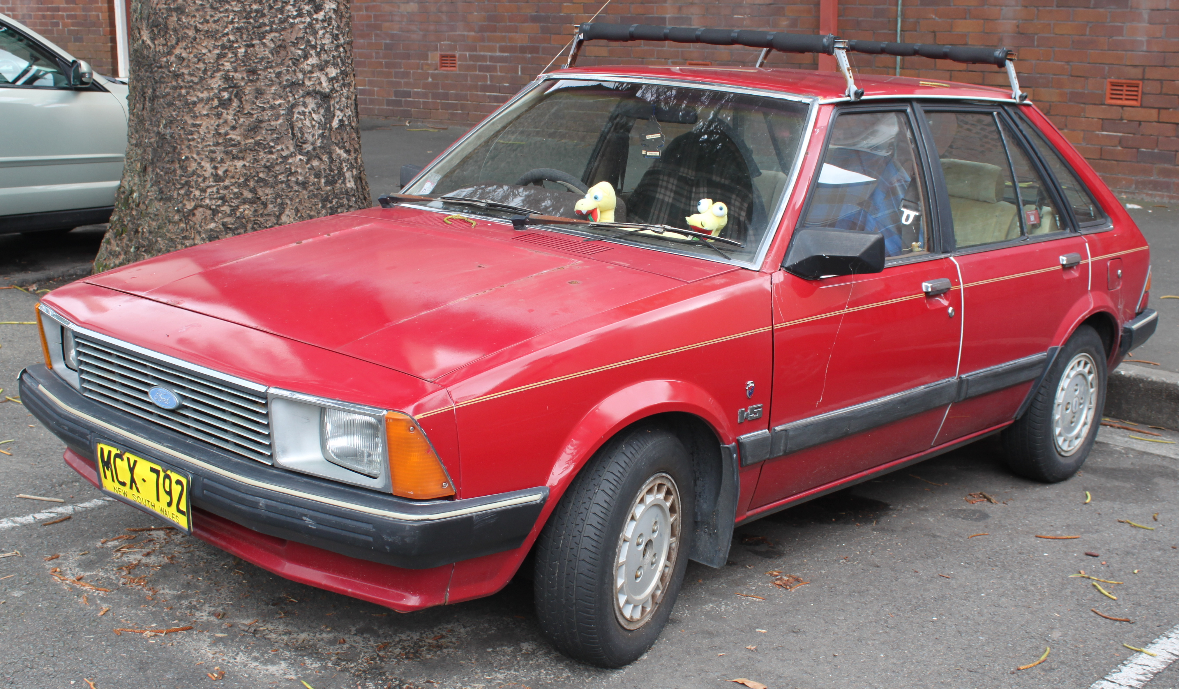 Ford Laser KA Ghia